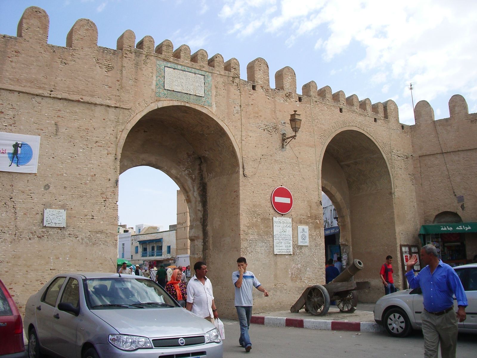 Portes de la muralla de Kairouan